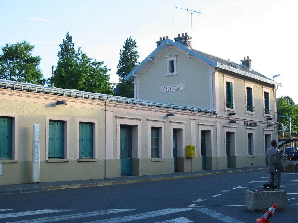 gare de Palaiseau, RER B, France